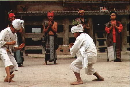 Dua Orang Pendekar Pemperagakan Jurus Mossak